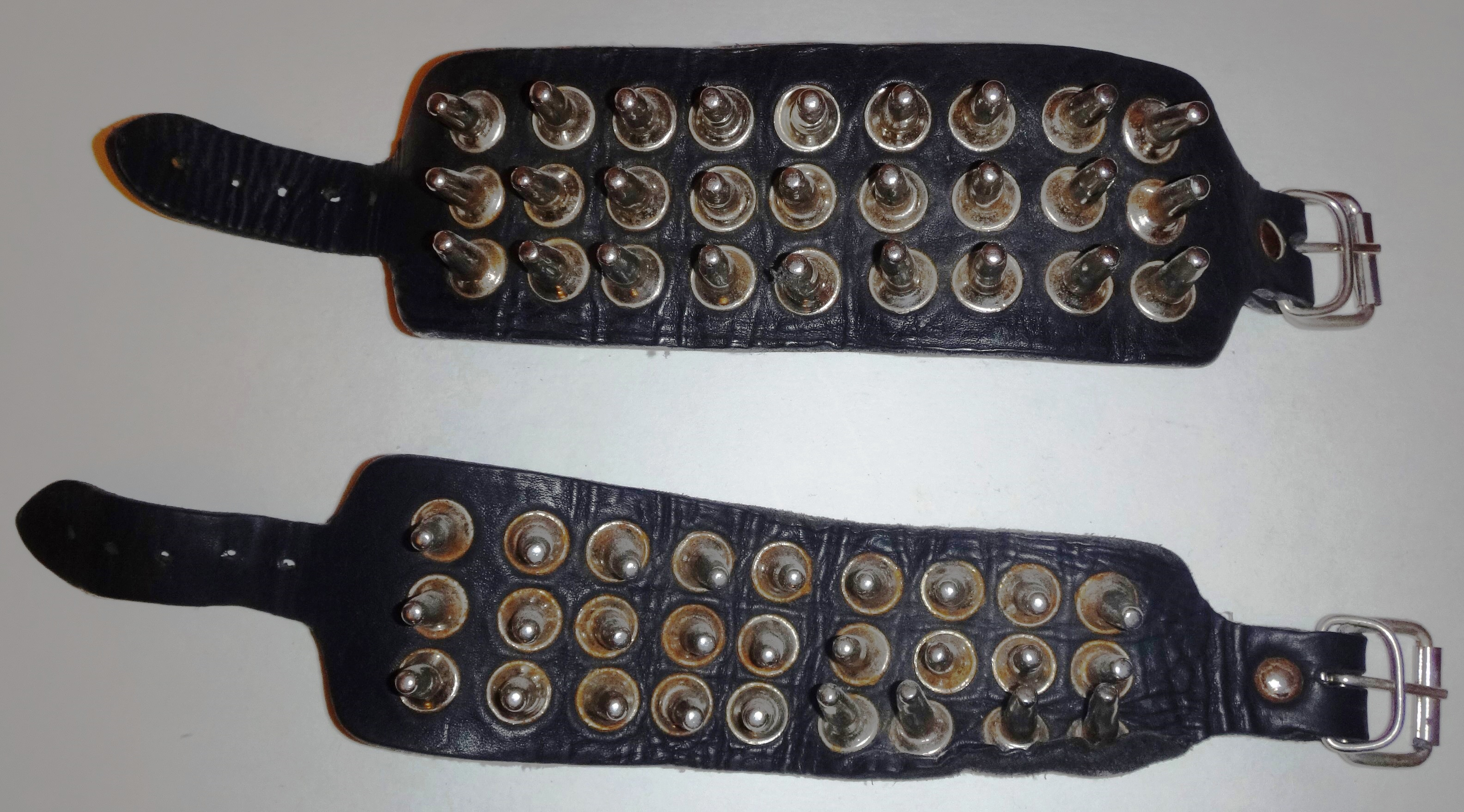 Кожаные браслеты с шипами. Весьма характерны для рокеров и металлистов